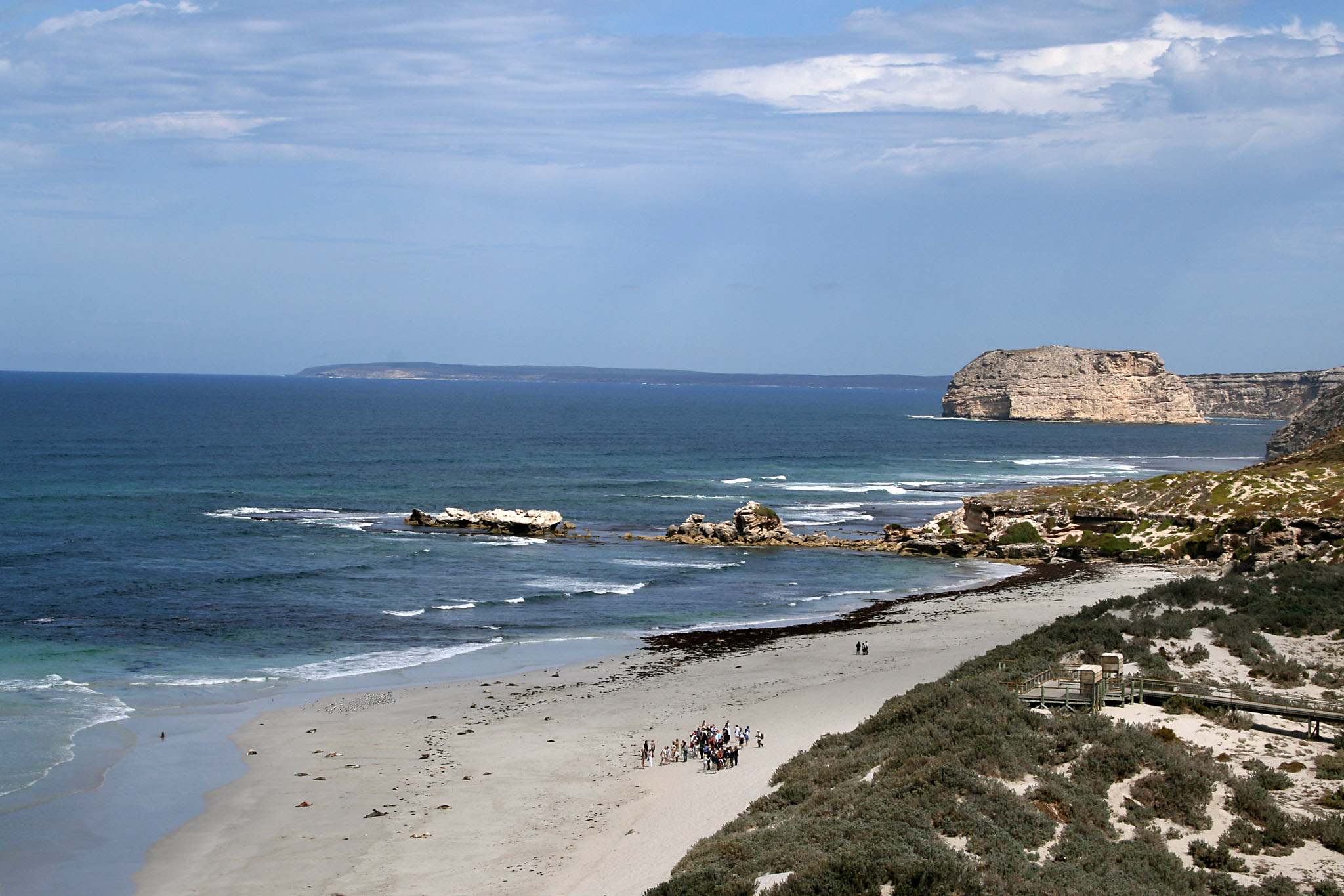 Seal Bay, Kangaroo Island, Australia